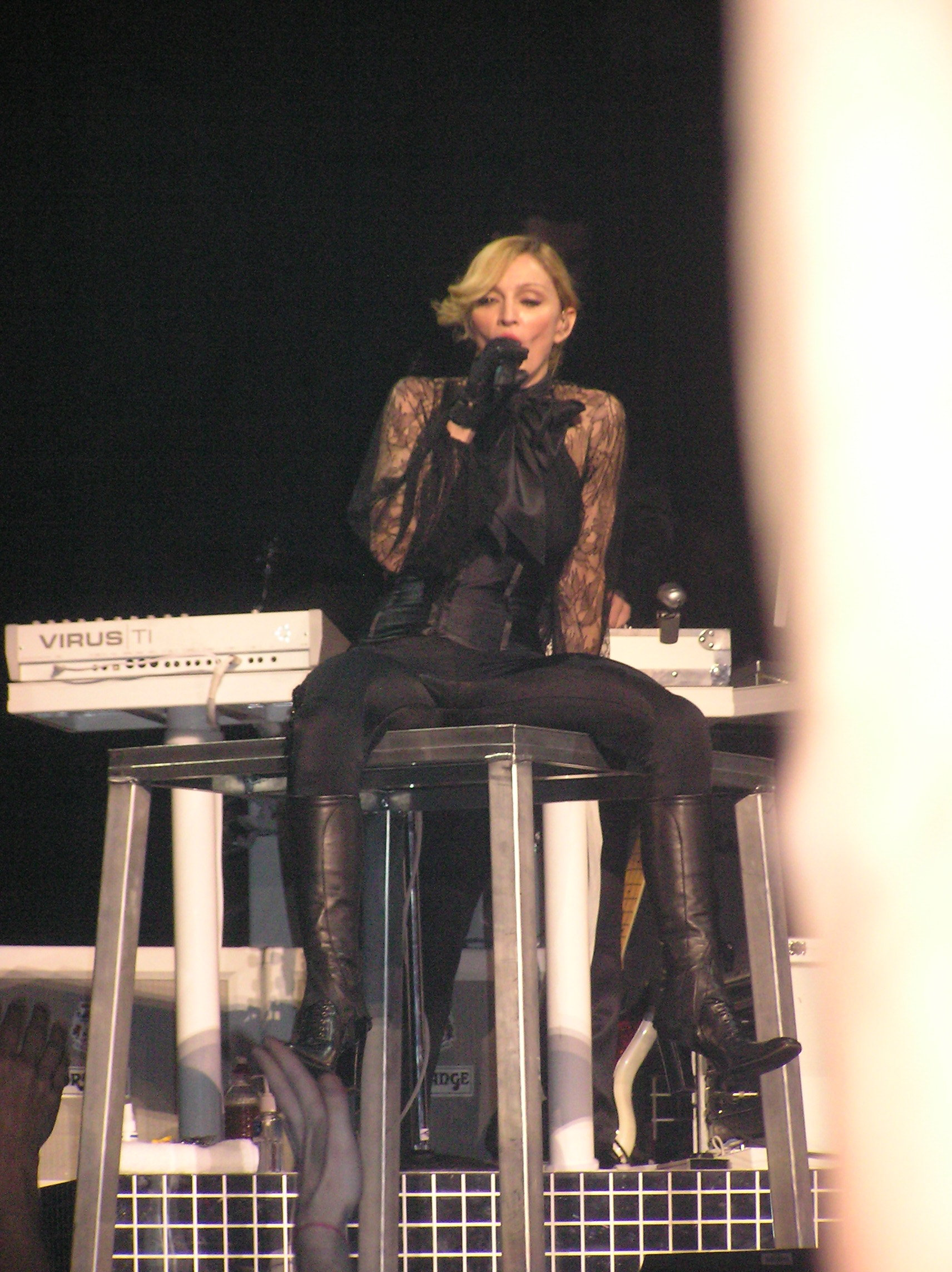 2006 6-5 Fresno trip (50)